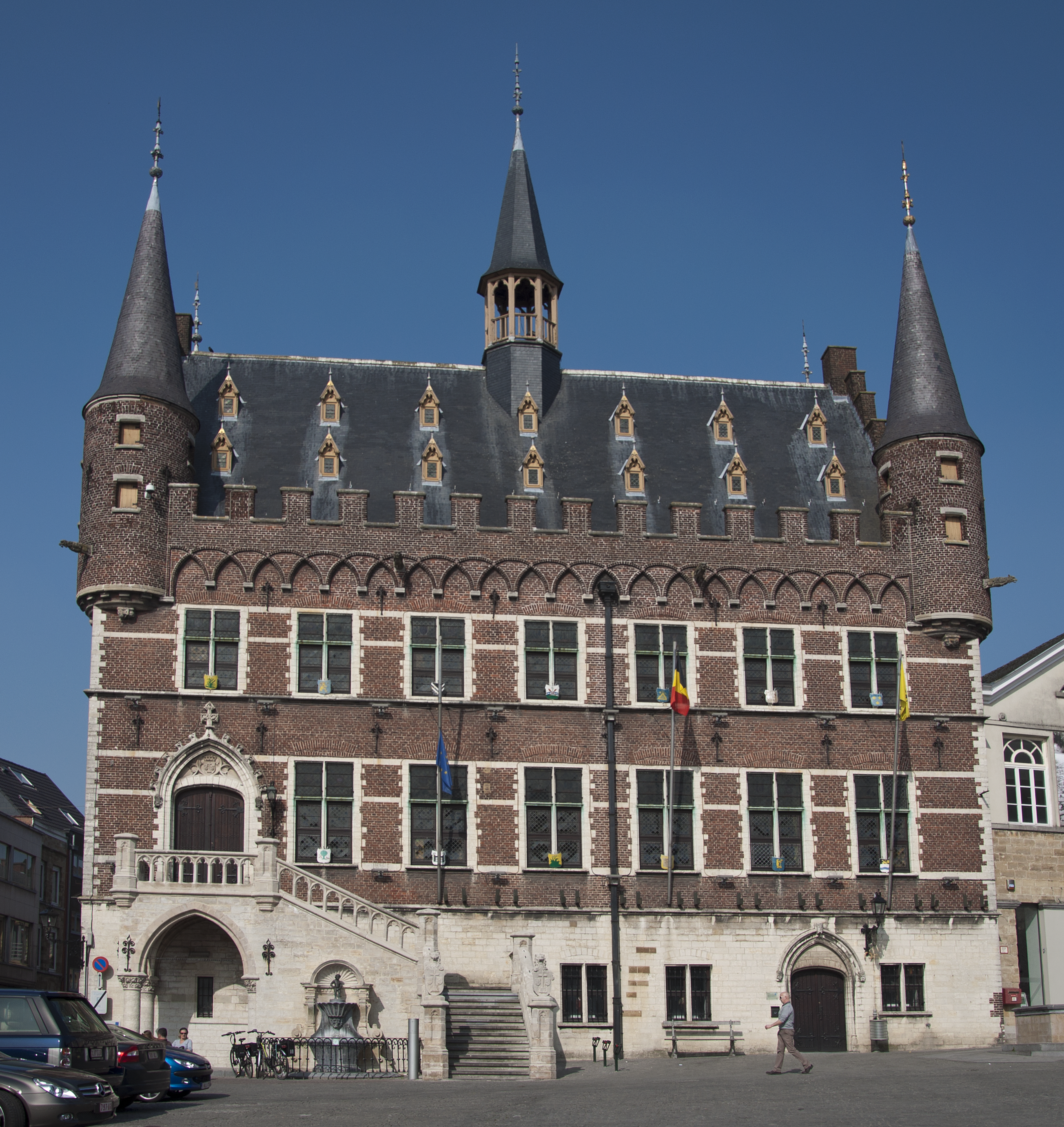 Het gemeentehuis van Geraardsbergen